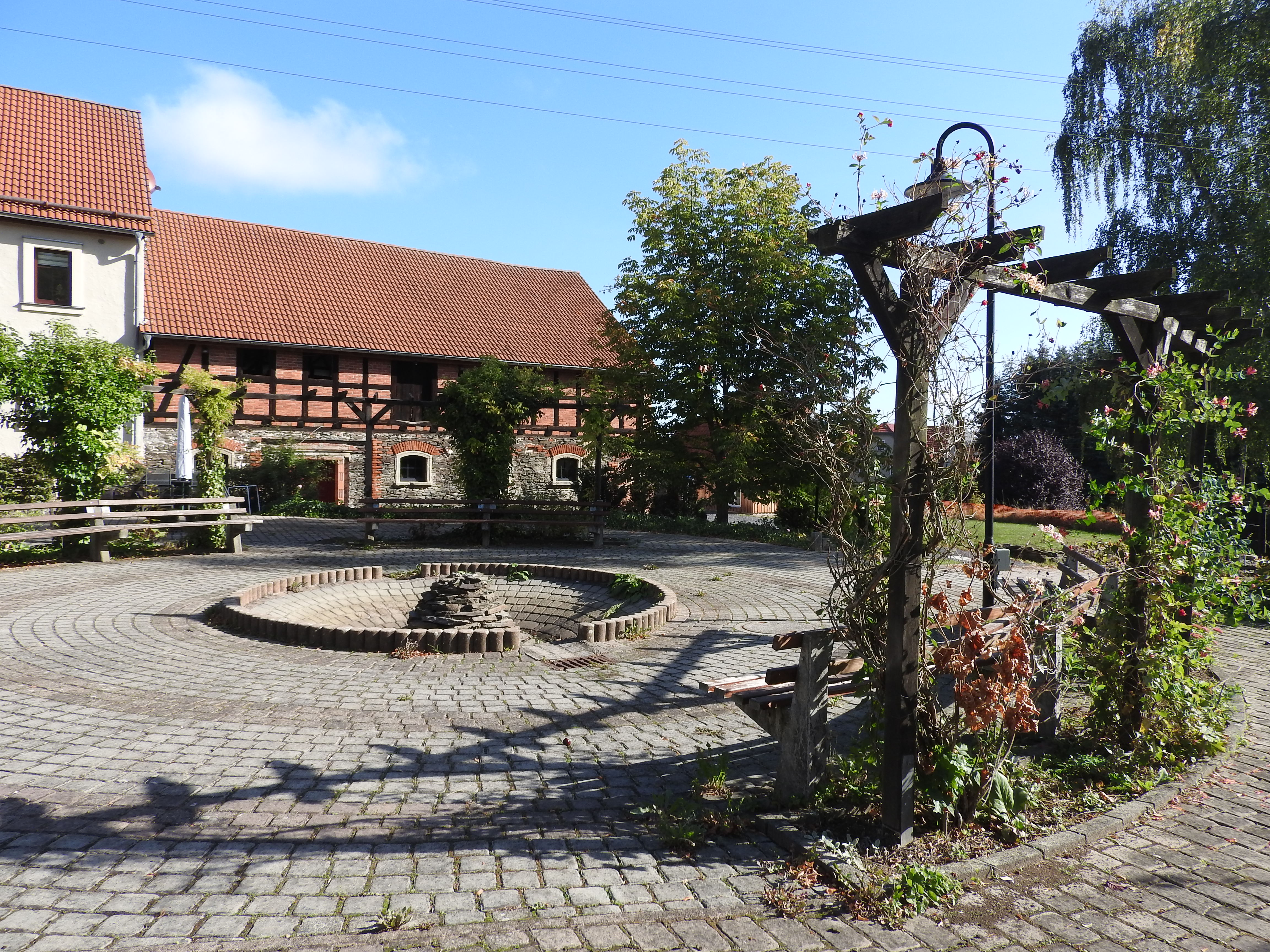 Dorfplatz in Lemnitz, Thüringen